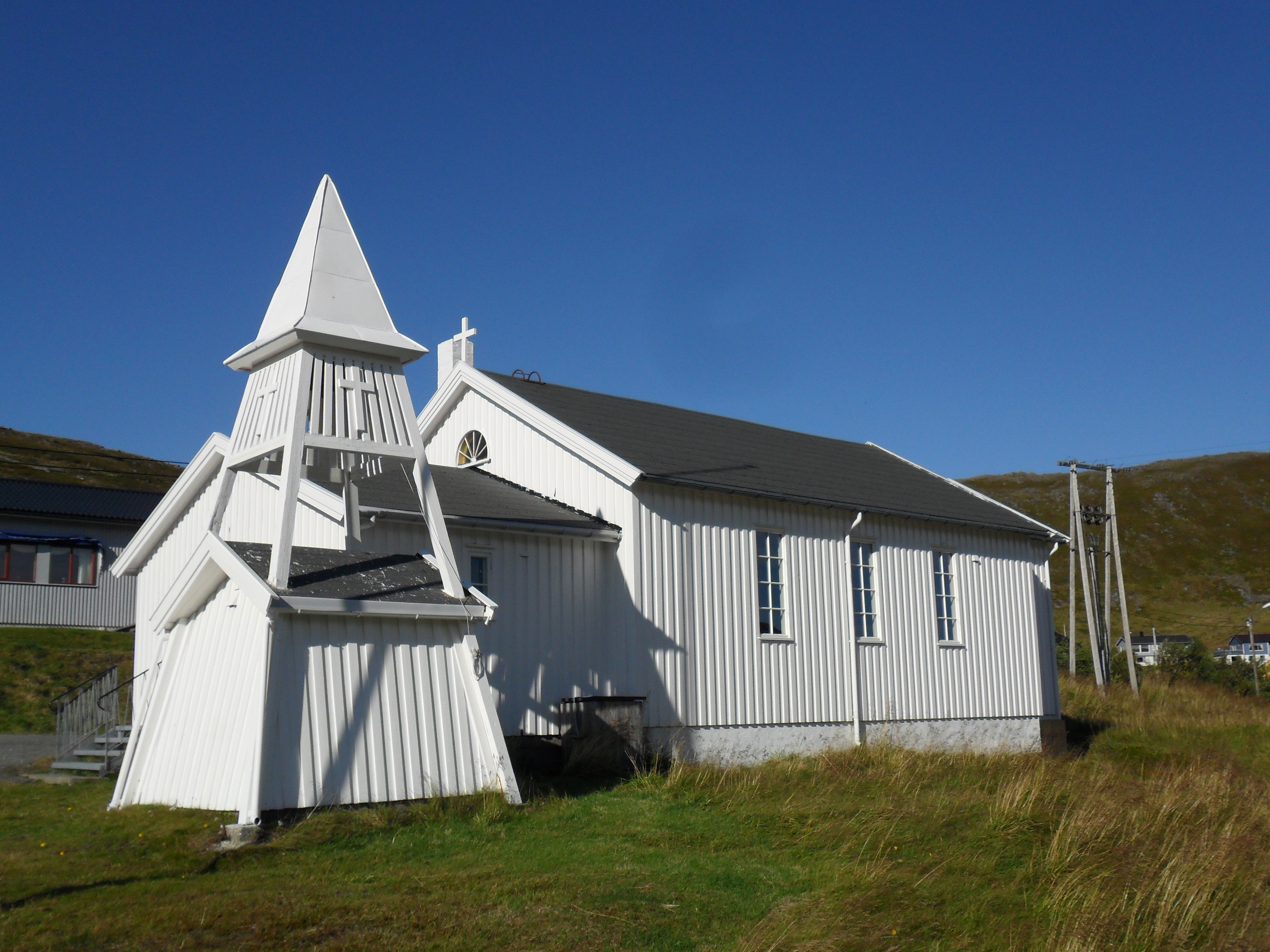 Skarsvåg kirke i Nordkapp kommune, Finnmark. Innviet 6 august 1961 av biskop Alf Wiig.